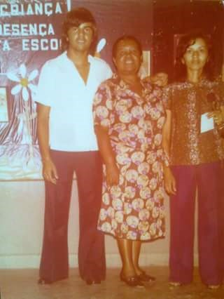 Foto da primeira diretora da escola, Miltolina.